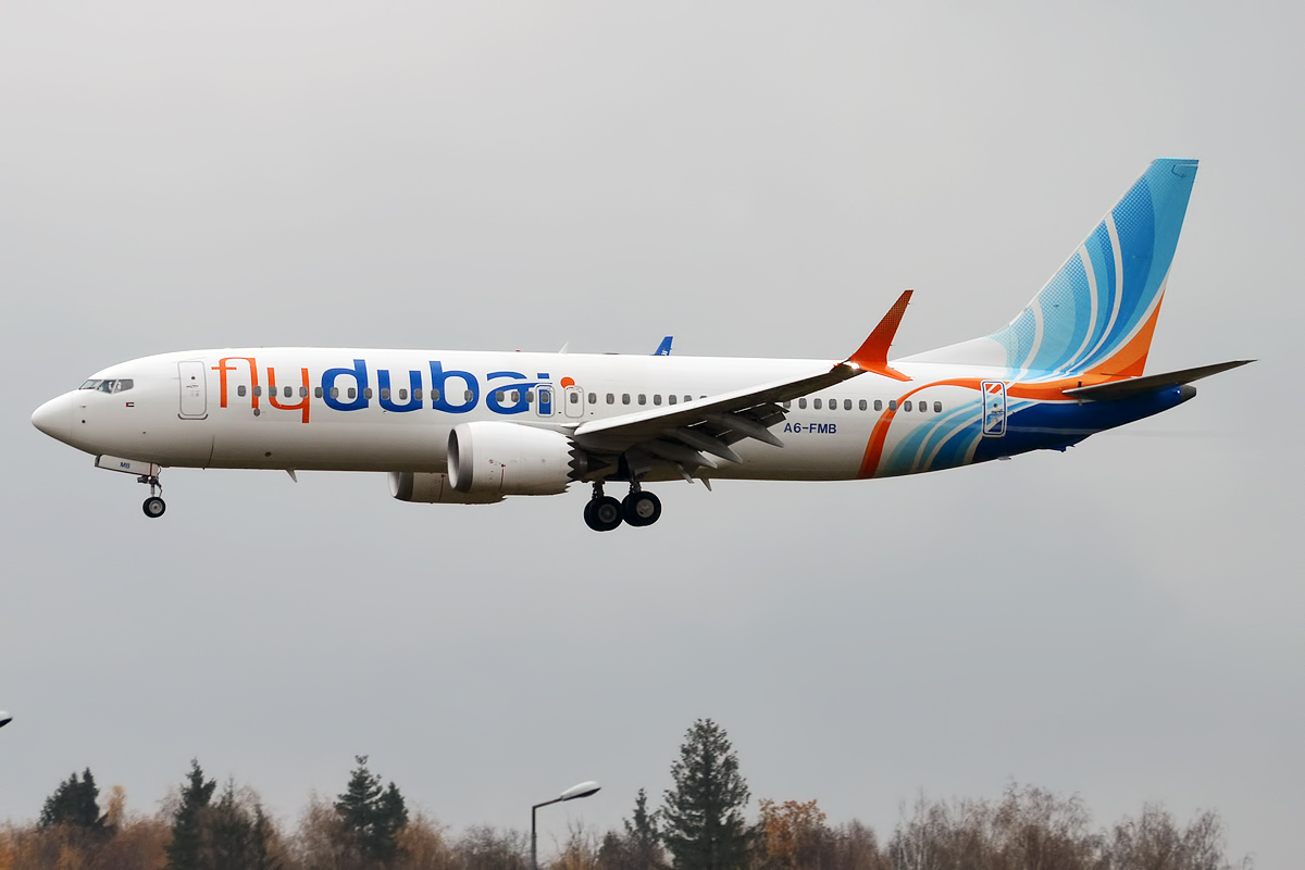 FlyDubai, A6-FMB, Boeing 737-8 MAX